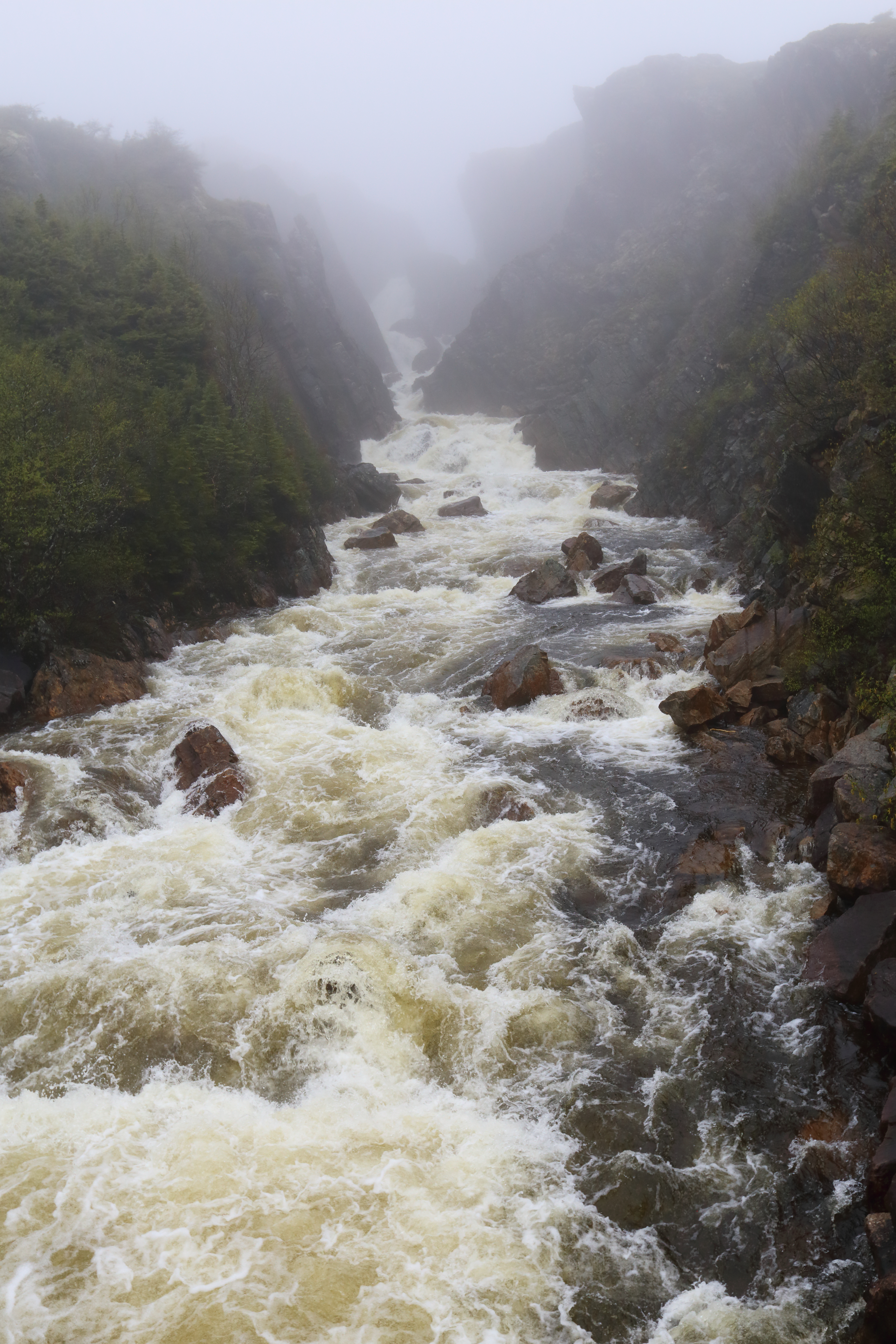 Chutes de Brador sur la Rivière Brador, Québec, Canada